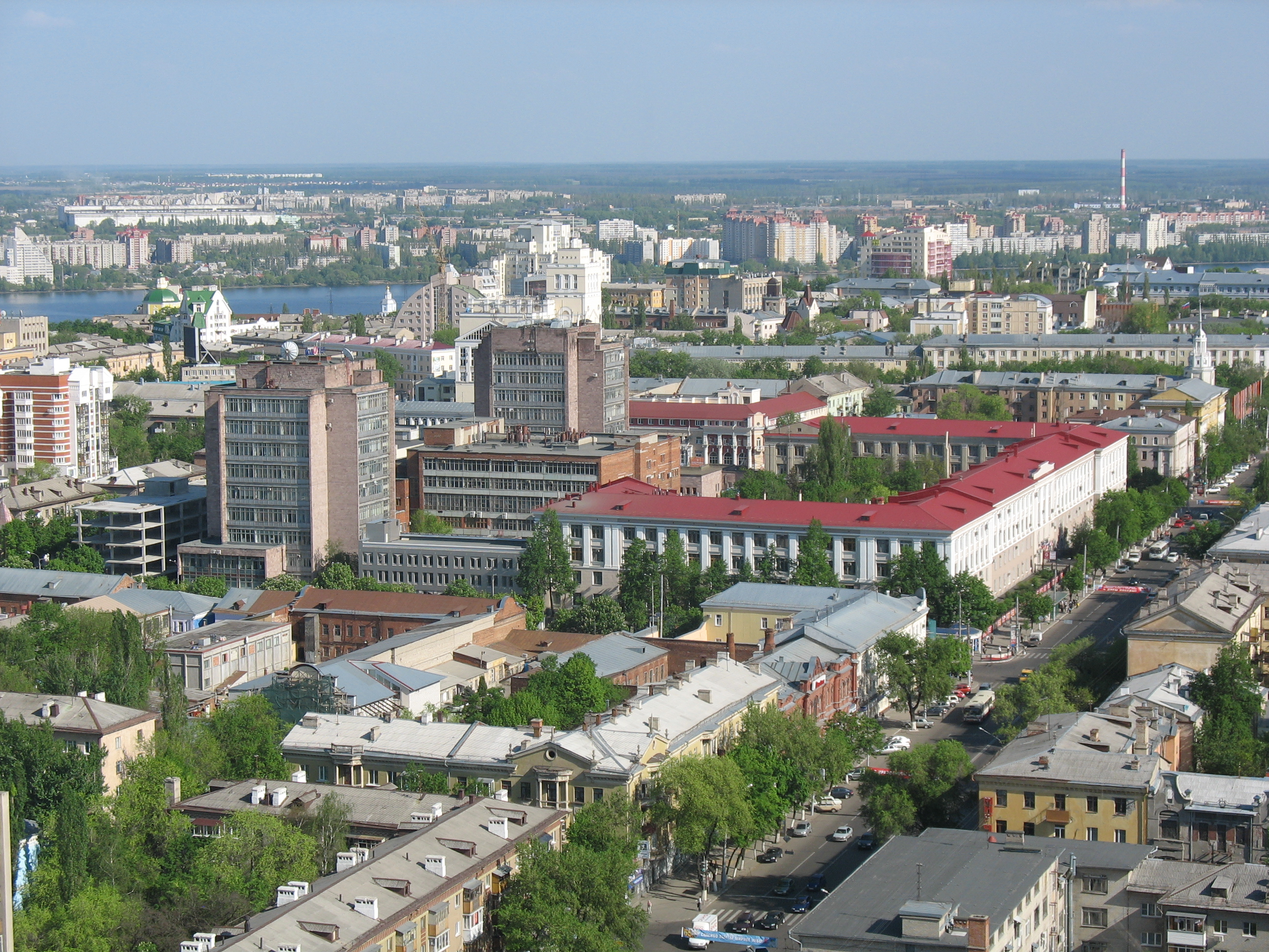 Концерн Созвездие с Галереи Чижова